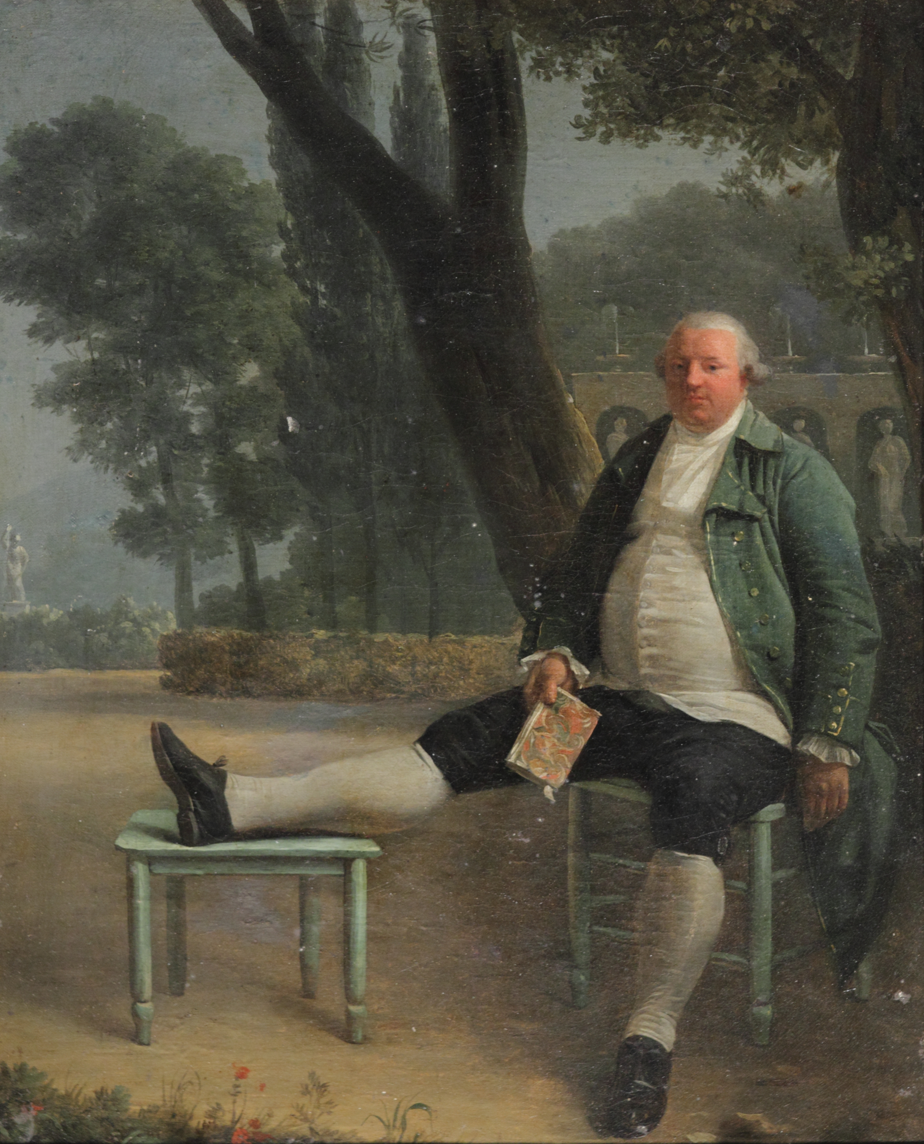 Henri-Pierre Danloux - Portrait d'Antoine de Sérilly